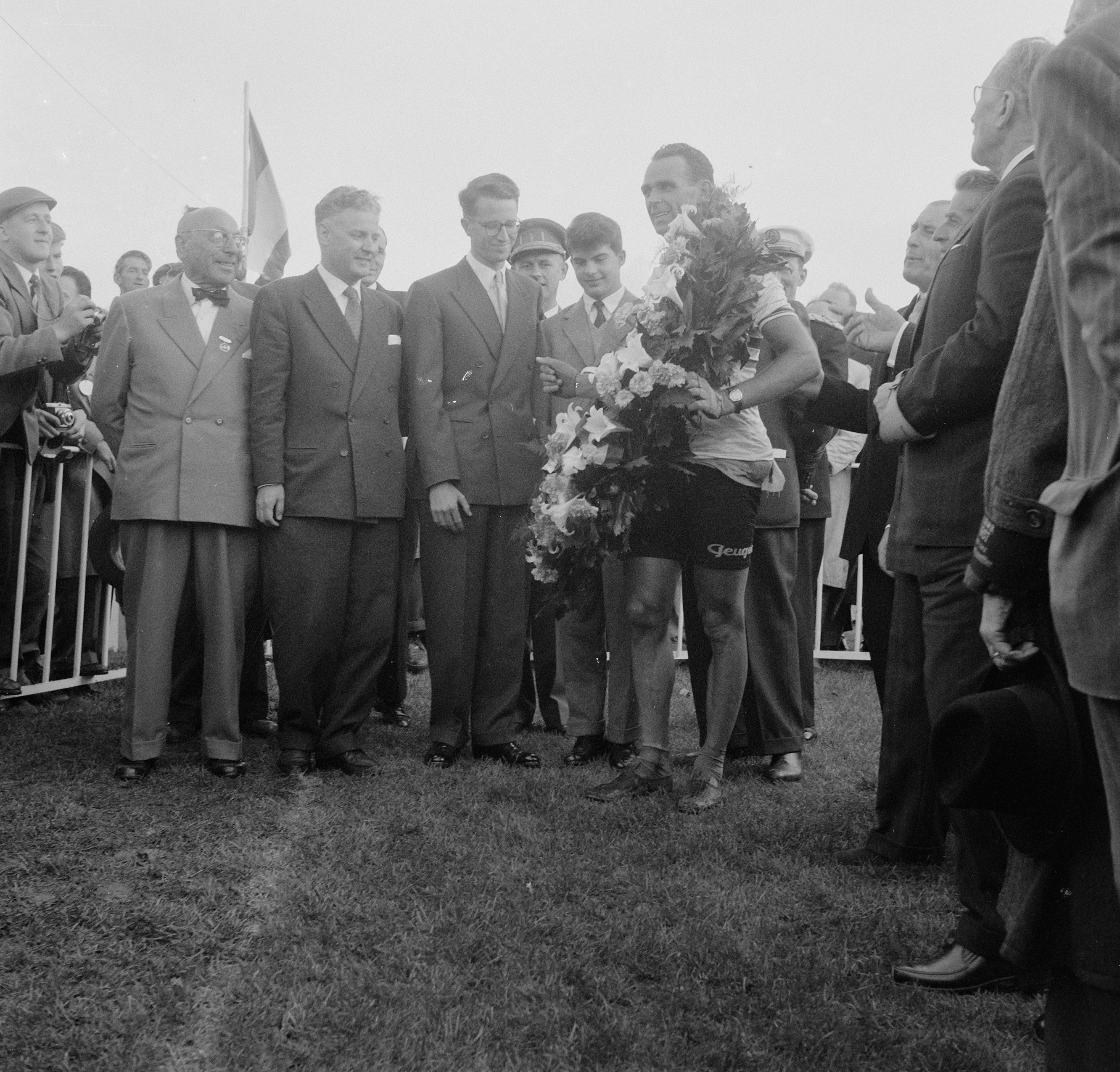 Collectie / Archief : Fotocollectie Anefo Reportage / Serie : Wereldkampioenschappen wielrennen op de weg 1957 Beschrijving : Huldiging van de wereldkampioen bij de professionals Rik van Steenbergen Datum : 18 augustus 1957 Locatie : België, Waregem Trefwoorden : huldigingen, wielrennen Persoonsnaam : Albert (prins België), Boudewijn (koning België), Steenbergen, Rik van Fotograaf : Pot, Harry / Anefo Auteursrechthebbende : Nationaal Archief Materiaalsoort : Negatief (zwart/wit) Nummer archiefinventaris : bekijk toegang 2.24.01.03 Bestanddeelnummer : 908-8785